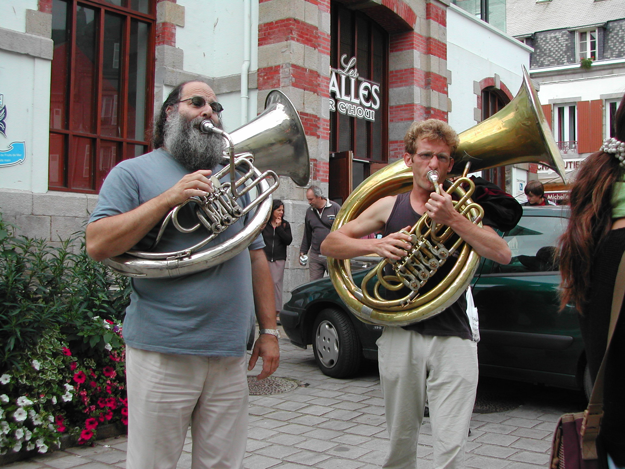 Joueurs d'hélicon devant les Halles de Douarnenez